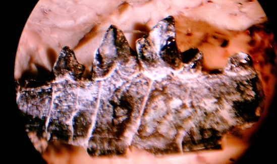 Ictidopappus mustelinus